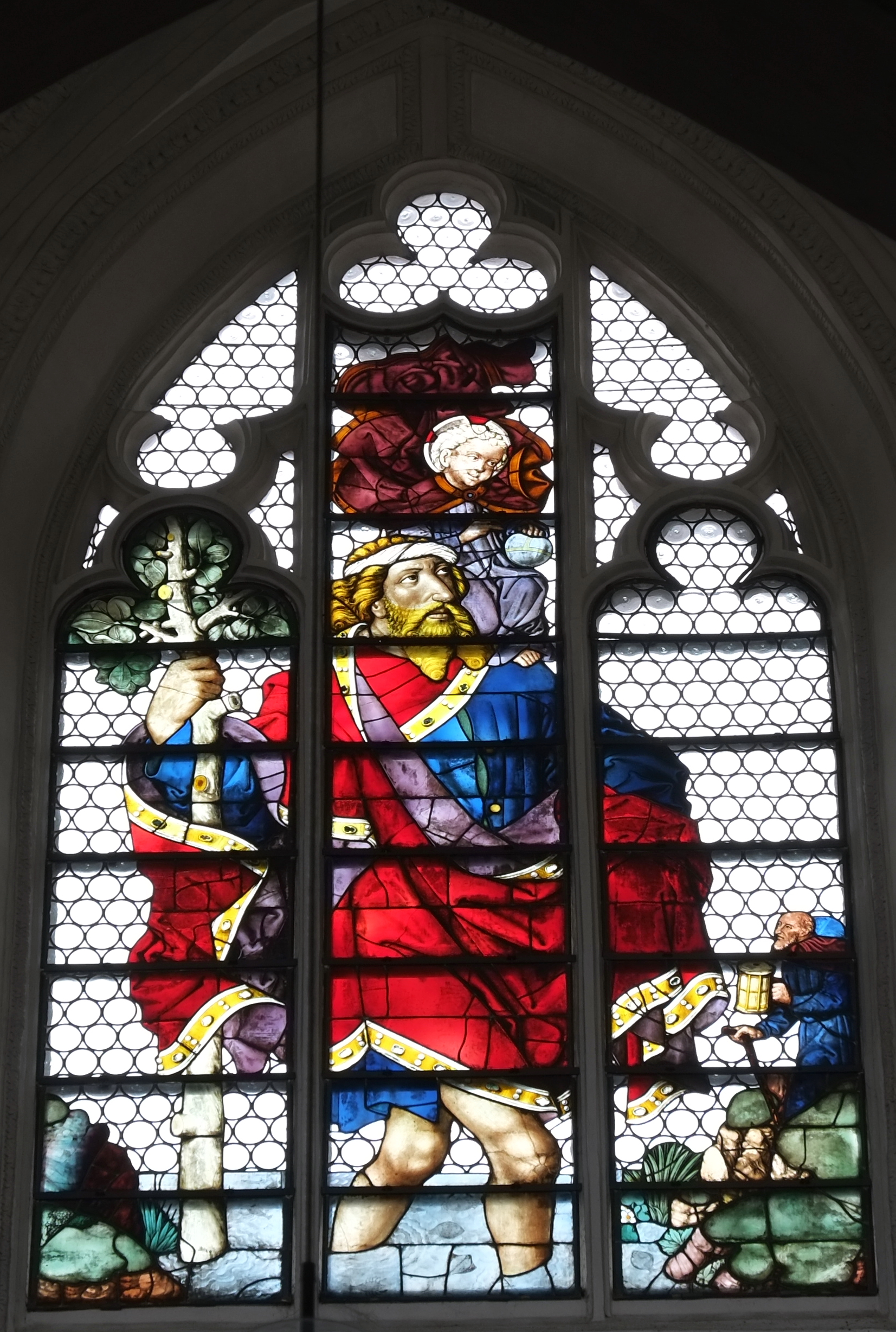 Bleiglasfenster in der Stadtpfarrkirche Mariä Himmelfahrt in Landsberg am Lech (Bayern, Deutschland). Beschreibung siehe: Susanne Fischer: Die Münchner Schule der Glasmalerei. Studien zu den Glasgemälden des späten 15. und frühen 16. Jahrhunderts im Münchner Raum. (Arbeitshefte des Bayerischen Landesamtes für Denkmalpflege, Band 90) München 1997, S. 68, ISBN 3-87490-652-3